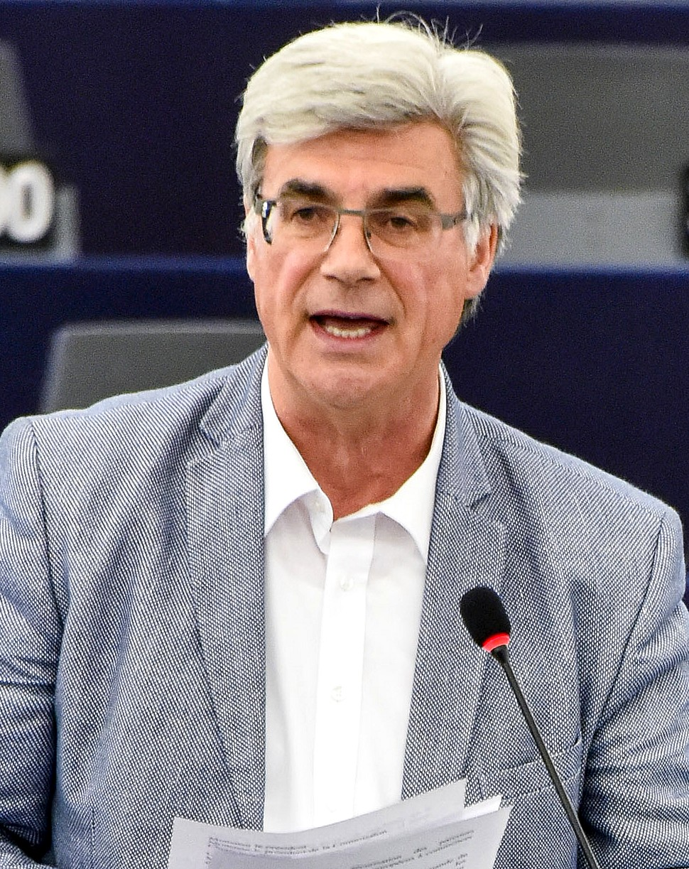 Patrick Le Hyaric intervenant en assemblée plénière du Parlement européen le 13 septembre 2017